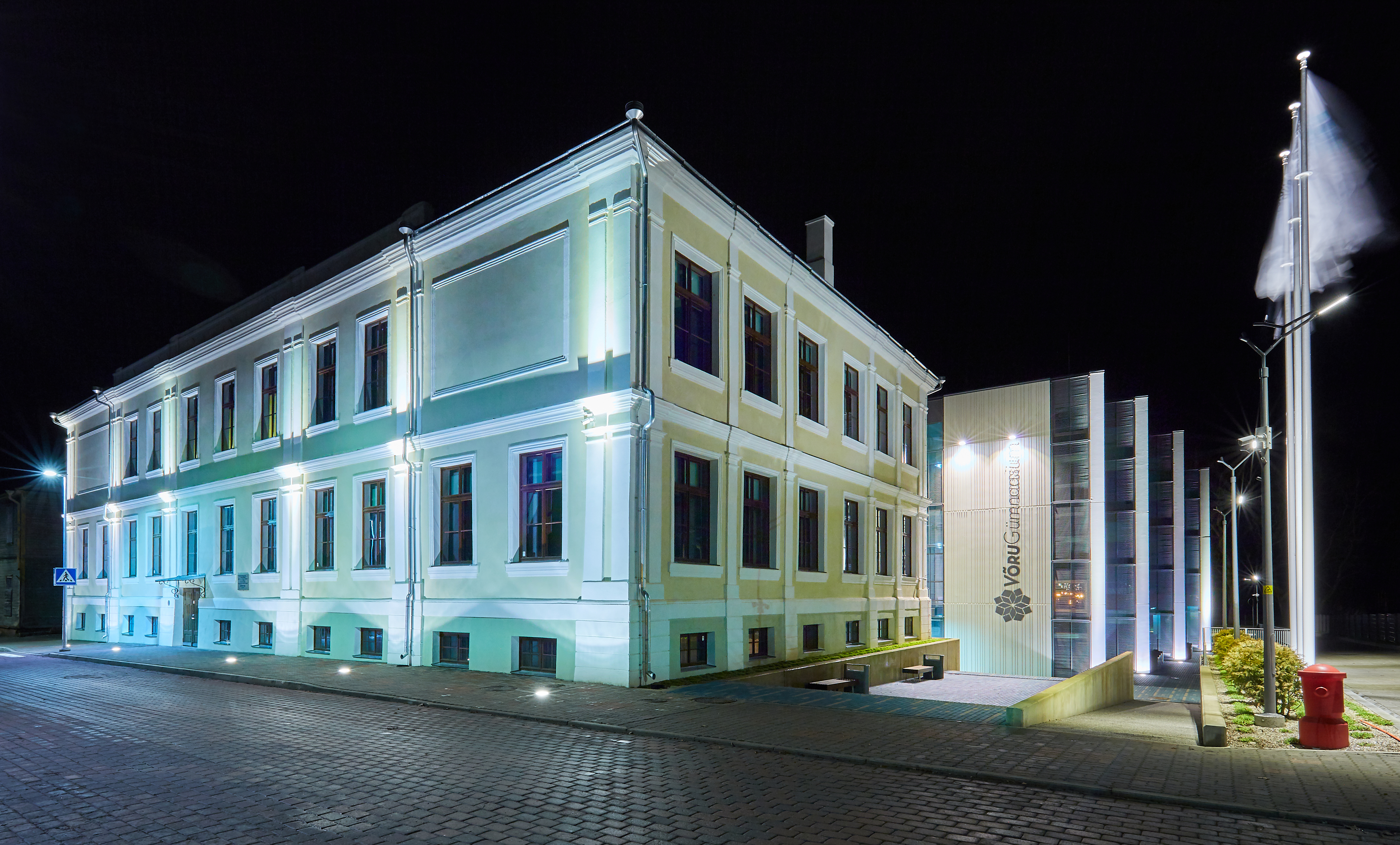 Võru Gümnaasiumi hoone õhtul.